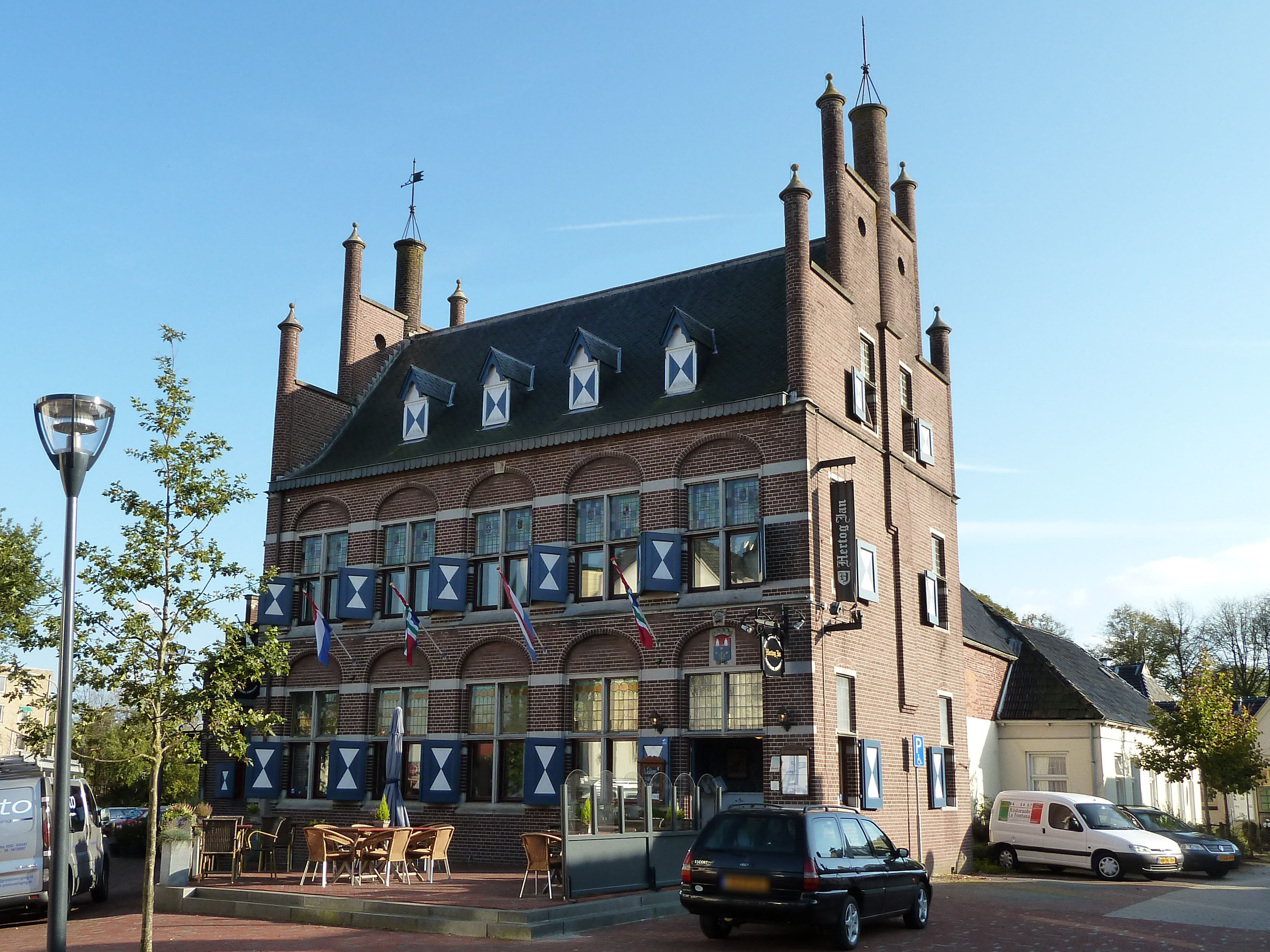 Oude gemeentehuis van Zuidhorn. Gebouwd in 1916 naar een ontwerp van Klaas Siekman, die waarschijnlijk inspiratie opdeed bij de Hoofdwacht van Groningen (in 1956 afgebroken). Deed tot 1990 (fusie met Grijpskerk, Oldehove en Aduard) dienst. Sinds 1997 is de fusiegemeente Zuidhorn in een nieuw gemeentehuis gehuisvest.